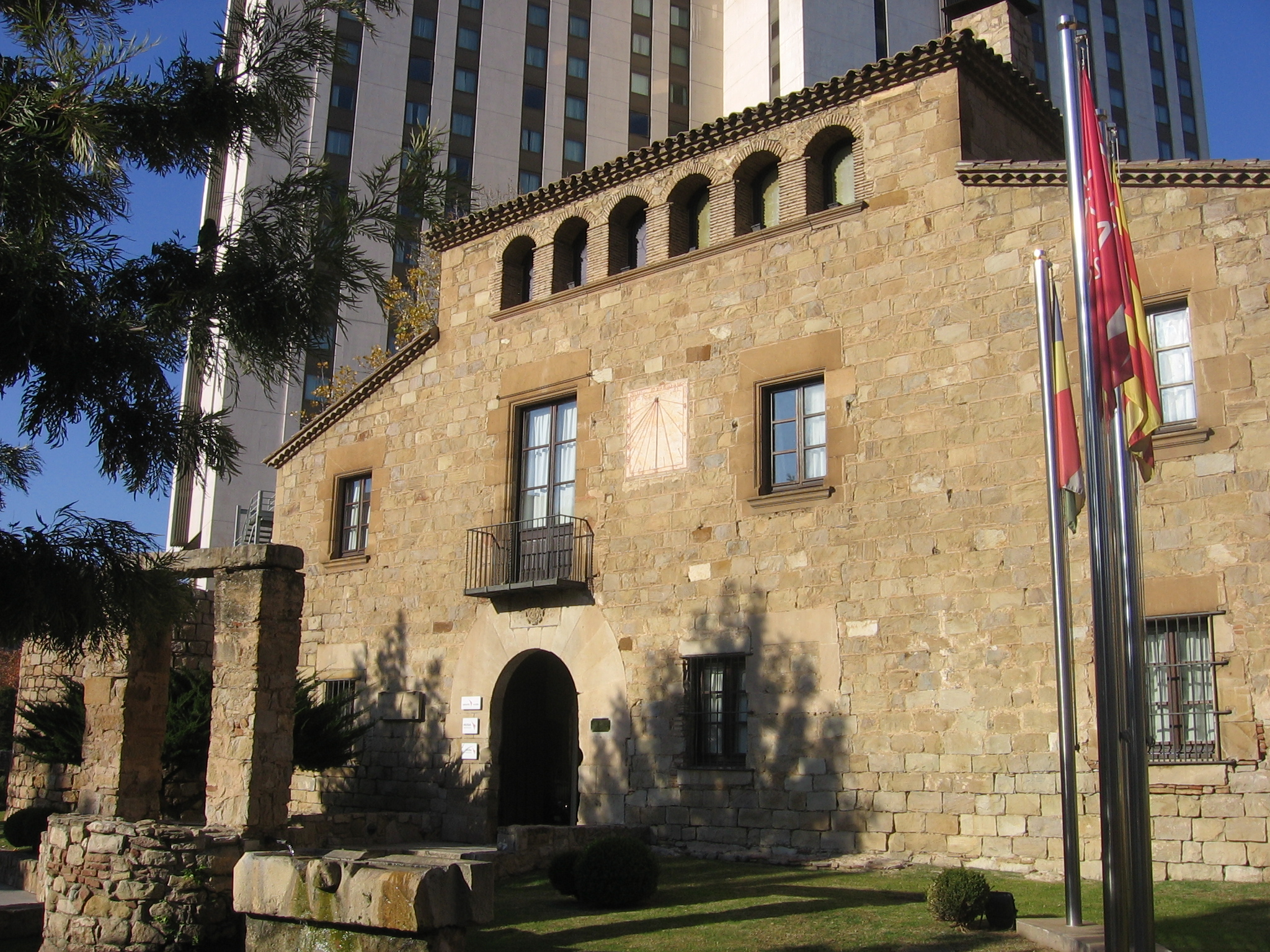 Torre Rodona (Can Vinyals).